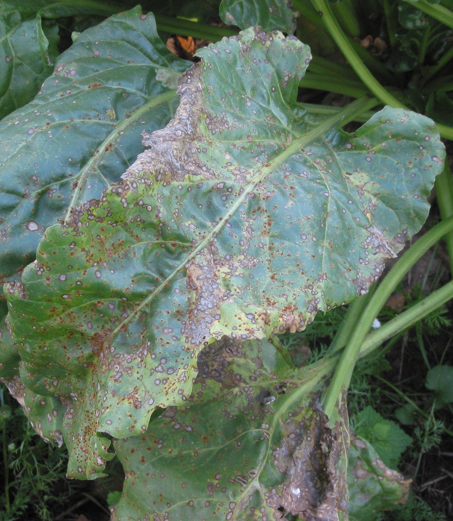 Suikerbiet (Beta vulgaris), Cercospora beticola schade